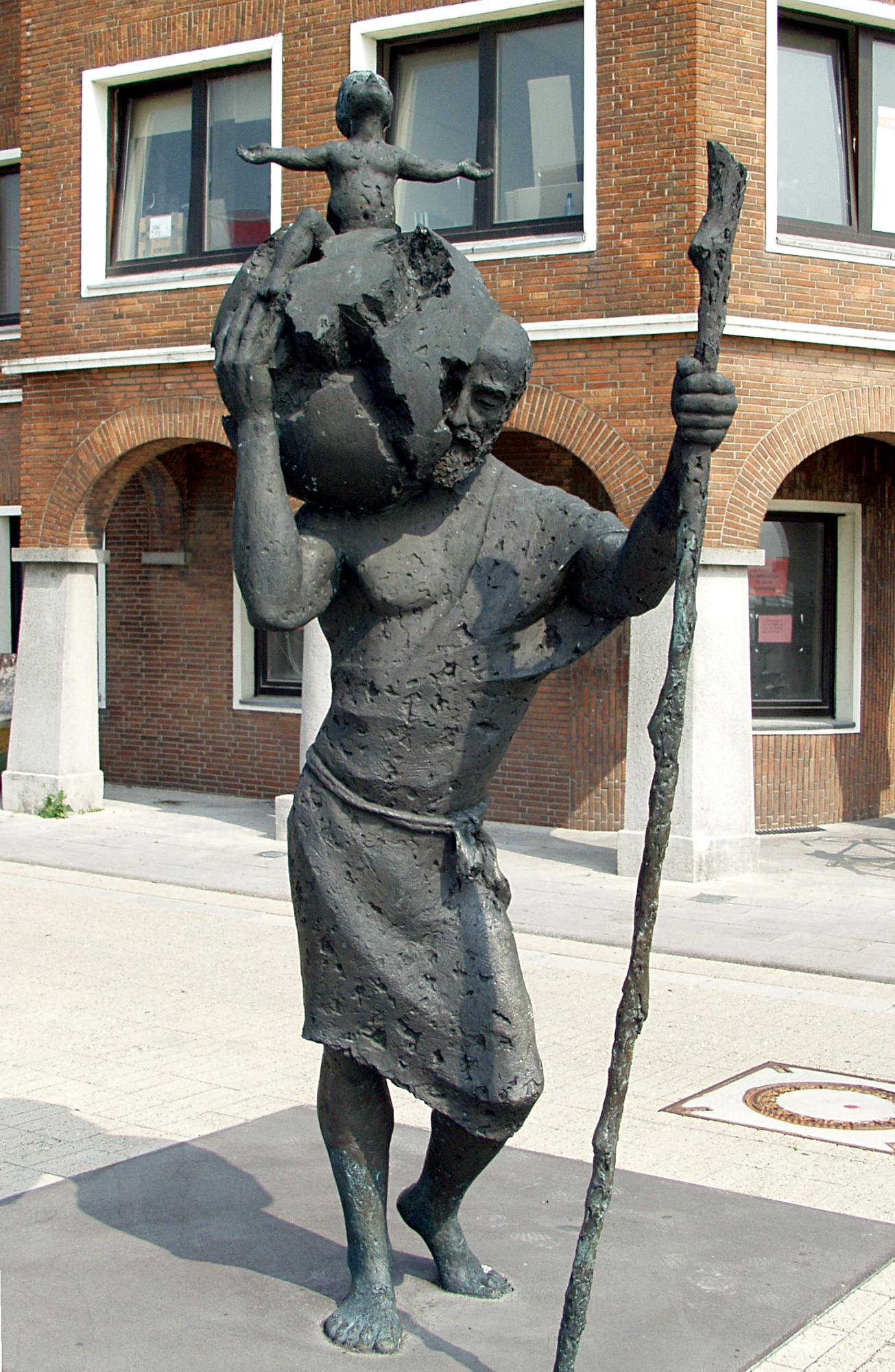 Emmerich am Rhein: Christophorus-Statue auf der neu gestalteten Rheinpromenade (eröffnet 2007). Bildhauer: Nikolaus Knupfer.